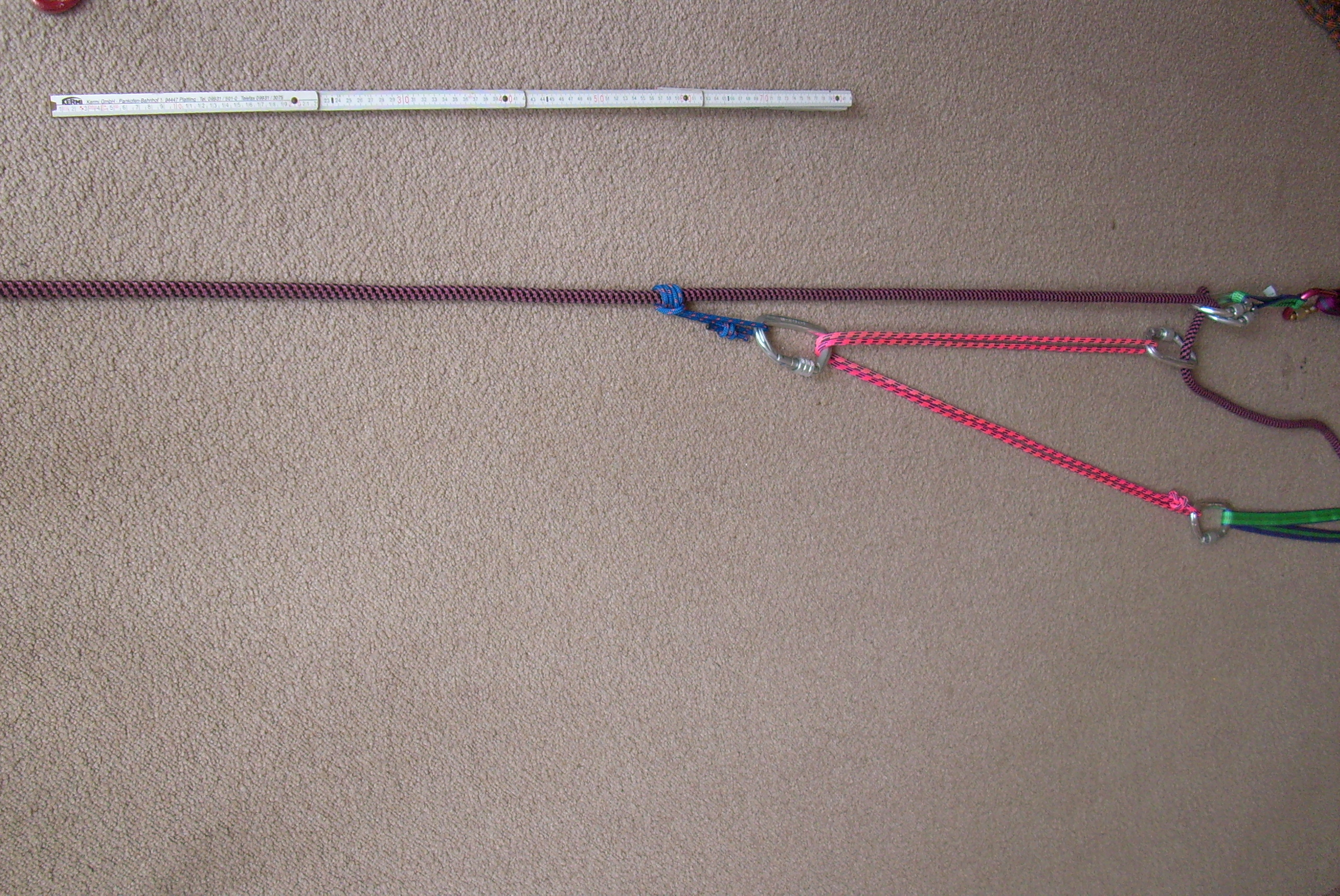 Schweizer Flaschenzug - Endposition nach dem Hub, die Rücklaufsperre blockiert, das Zugseil kann entlastet werden, der Umlenkpunkt an der kurzen Prusikschlinge wird wieder weiter geschoben bis diel lange Schlinge wieder maximal gestreckt ist. Und dann beginnt der nächste Hub.